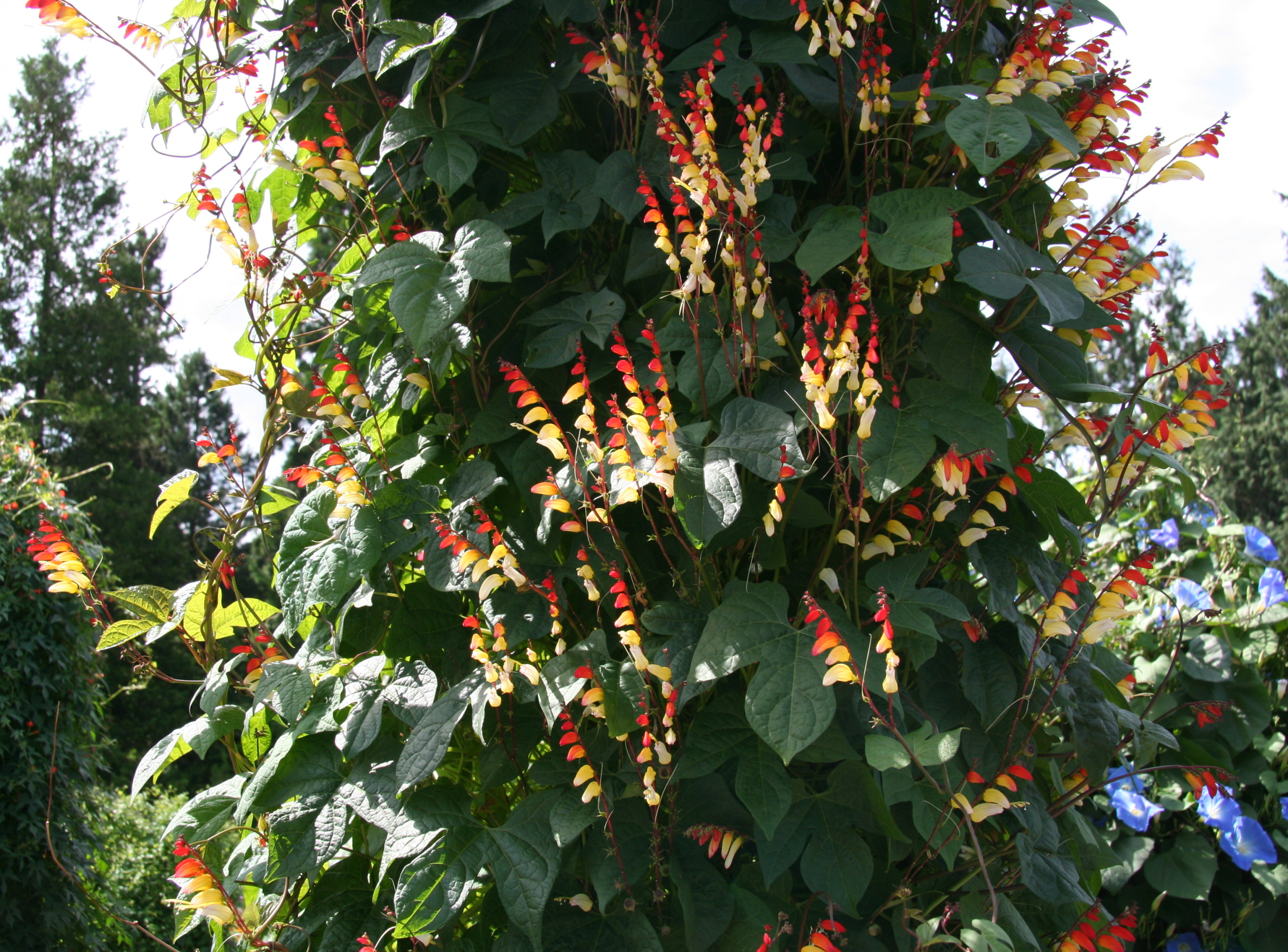 Ipomoea lobata im Botanischen Garten Dresden